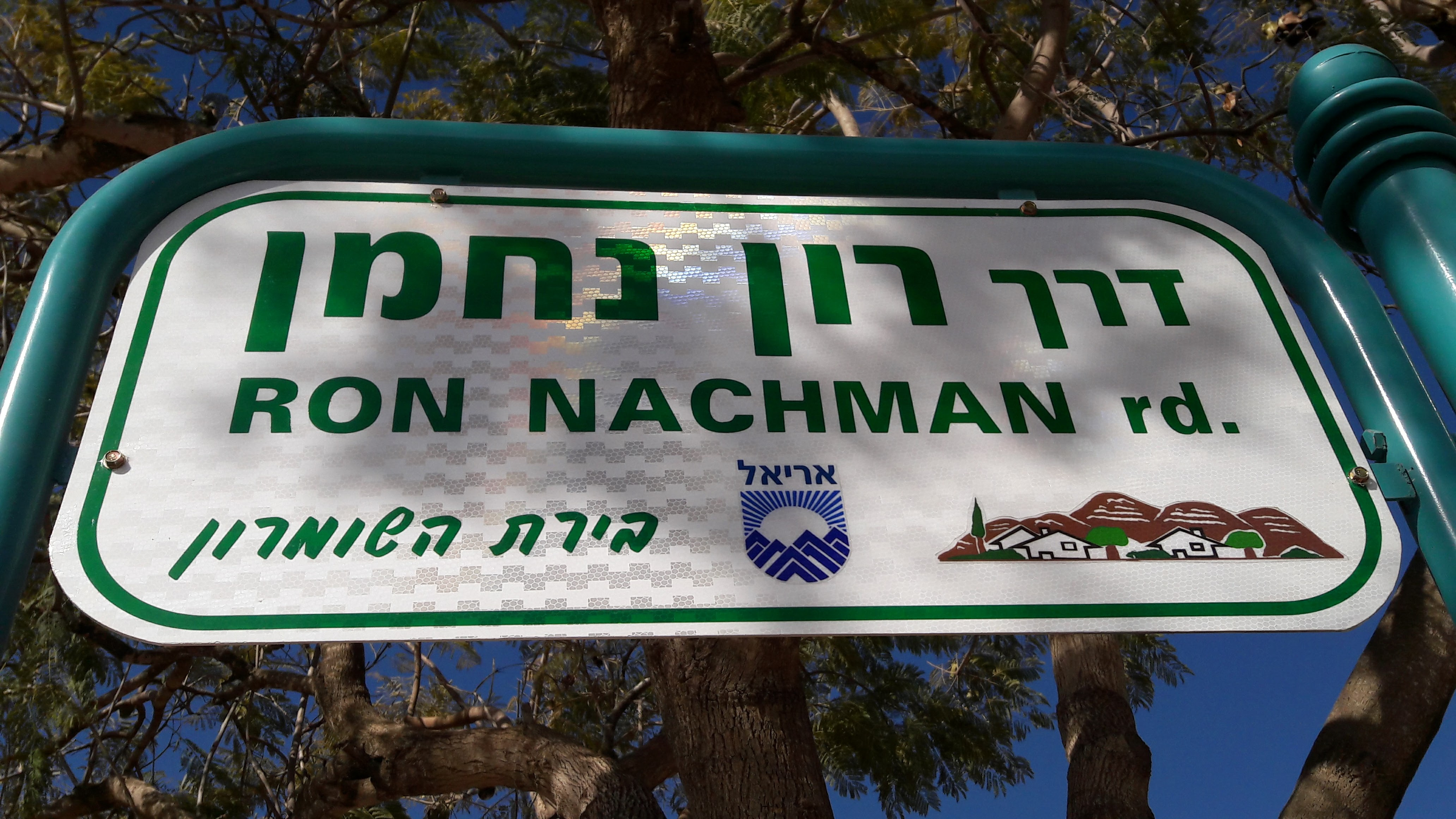 דרך רון נחמן באריאל